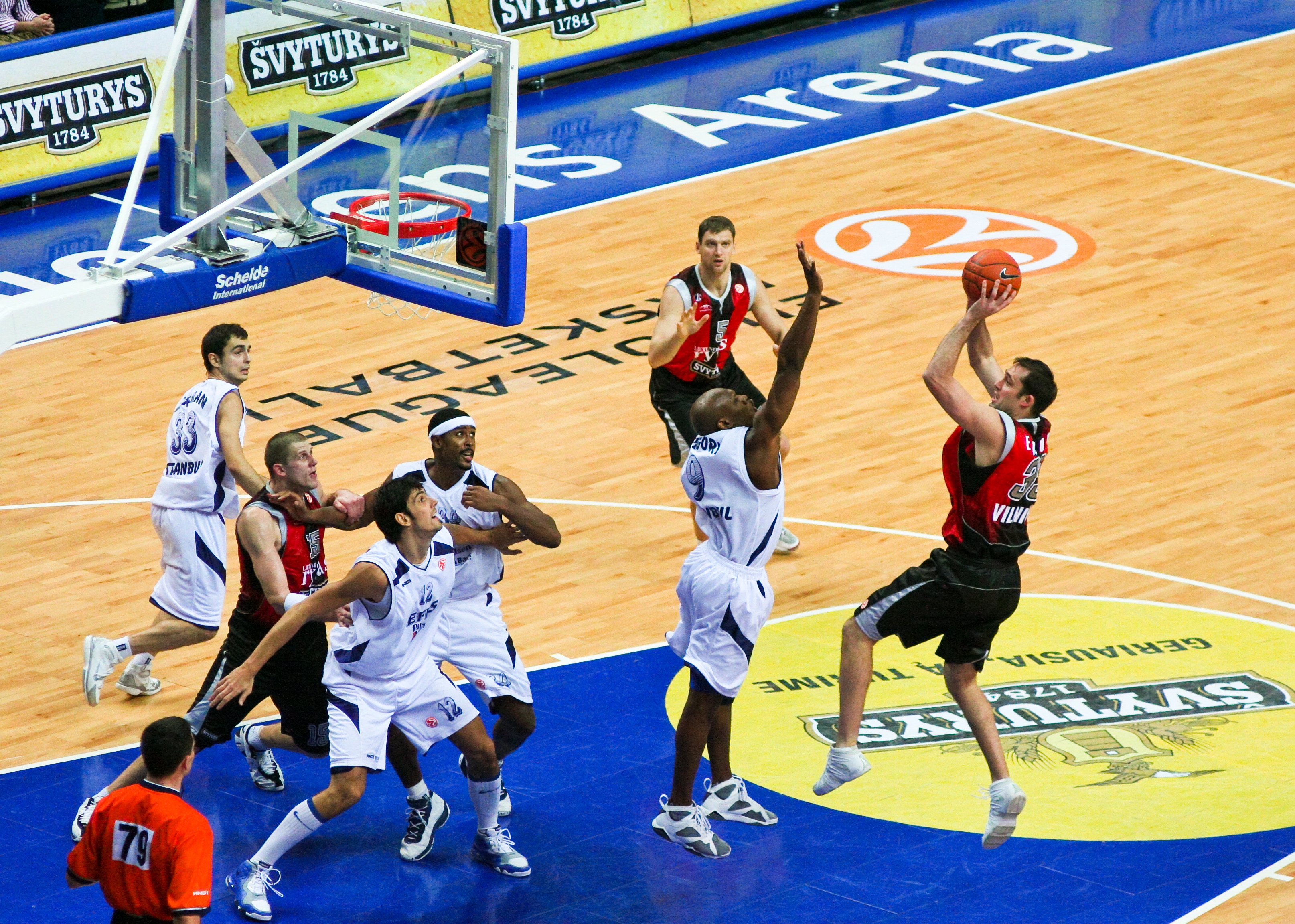 BC Lietuvos Rytas Vilnius home game against BC Efes Pilsen Istanbul in Siemens Arena, Lithuania